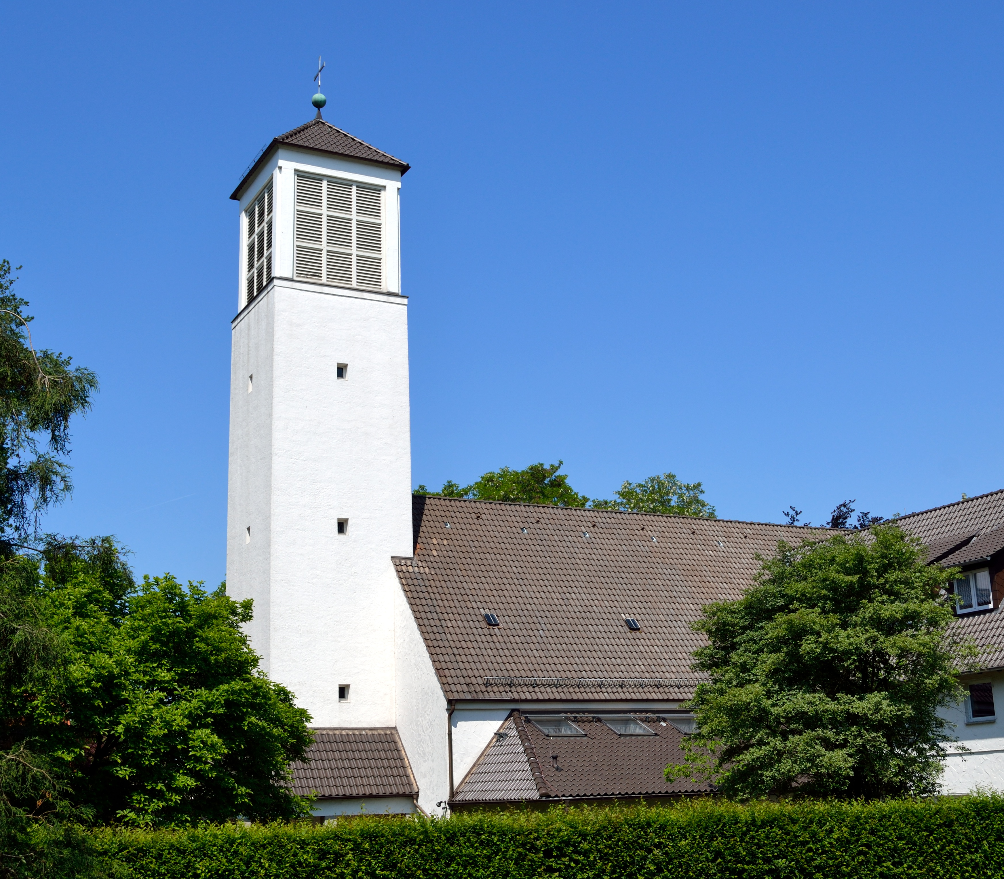 Evangelisch-reformierte Kirche in Detmold/Hiddesen